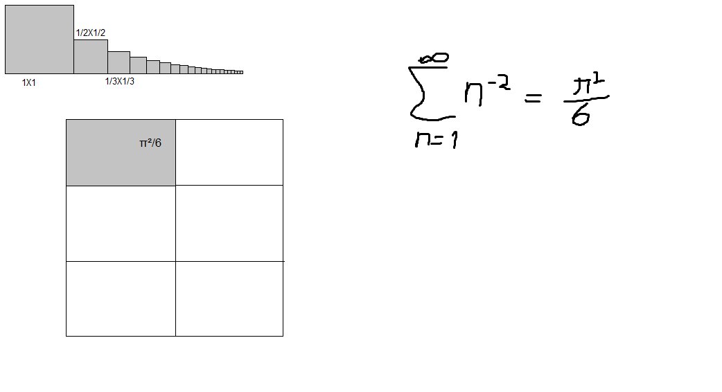 שטח סכומי הריבועים של ההופכיים למספרים הטבעיים (למעלה) שווה לשישית פאי בריבוע (שטח שישית מהריבוע התחתון)